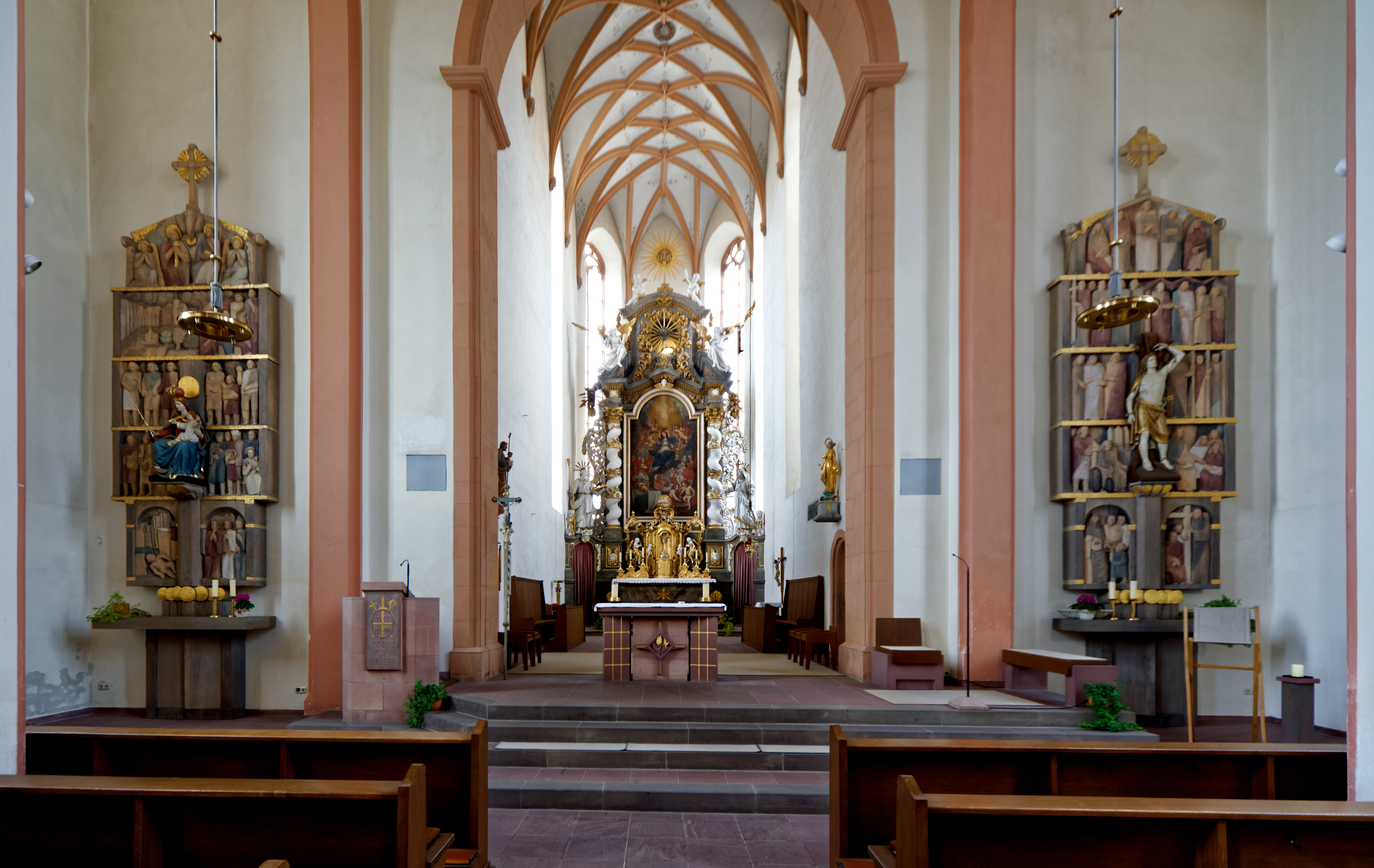 Die kleine Stadt Aub im Landkreis Würzburg.